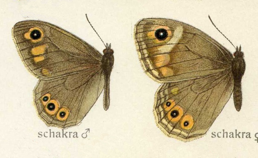 Lasiommata schakra, Satyrinae